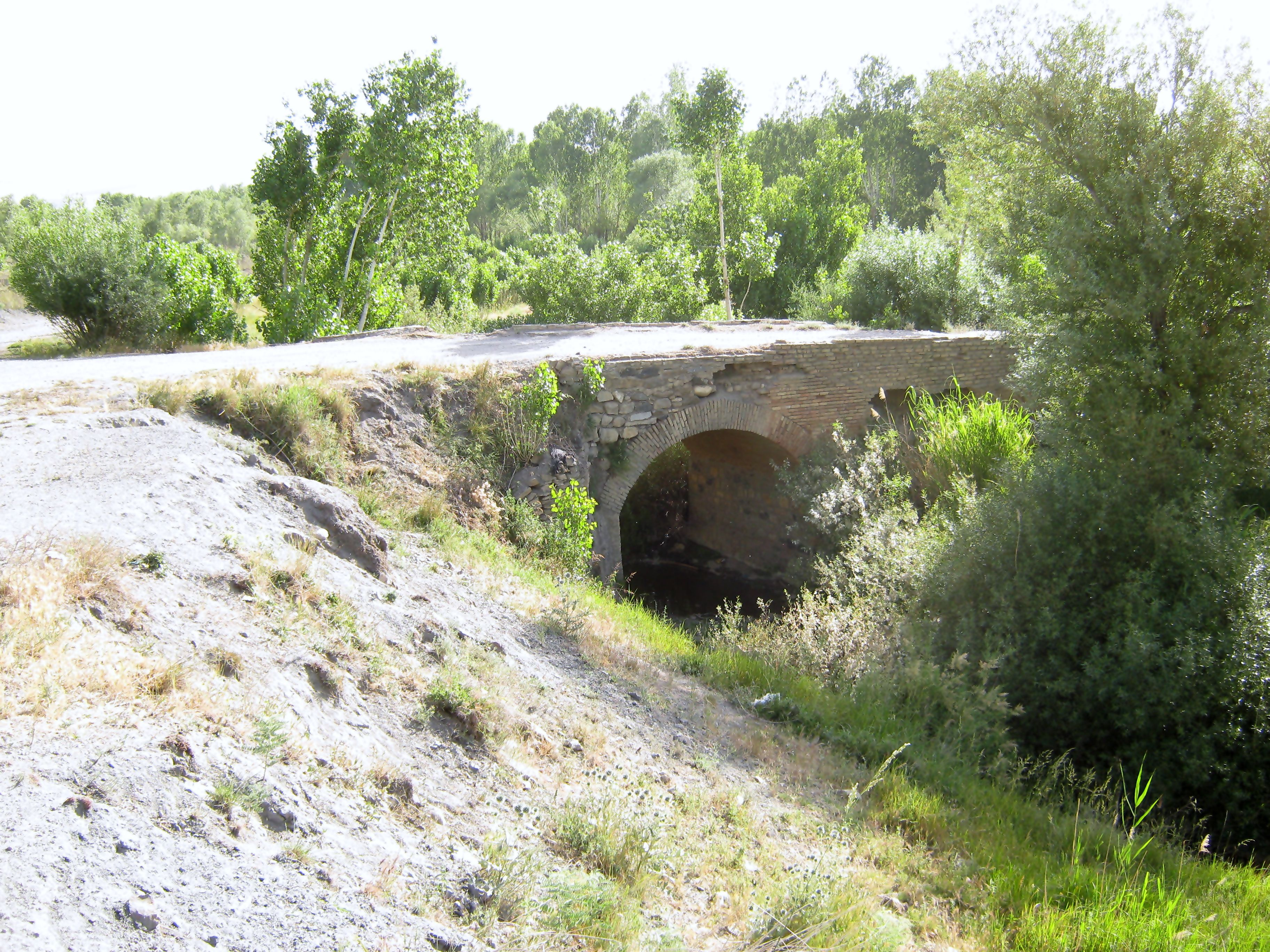 محدوده پل آرامند